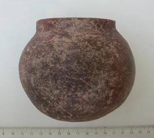 Gefäß der Dark Face Burnished Ware aus der spätneolithischen Siedlung von Shir